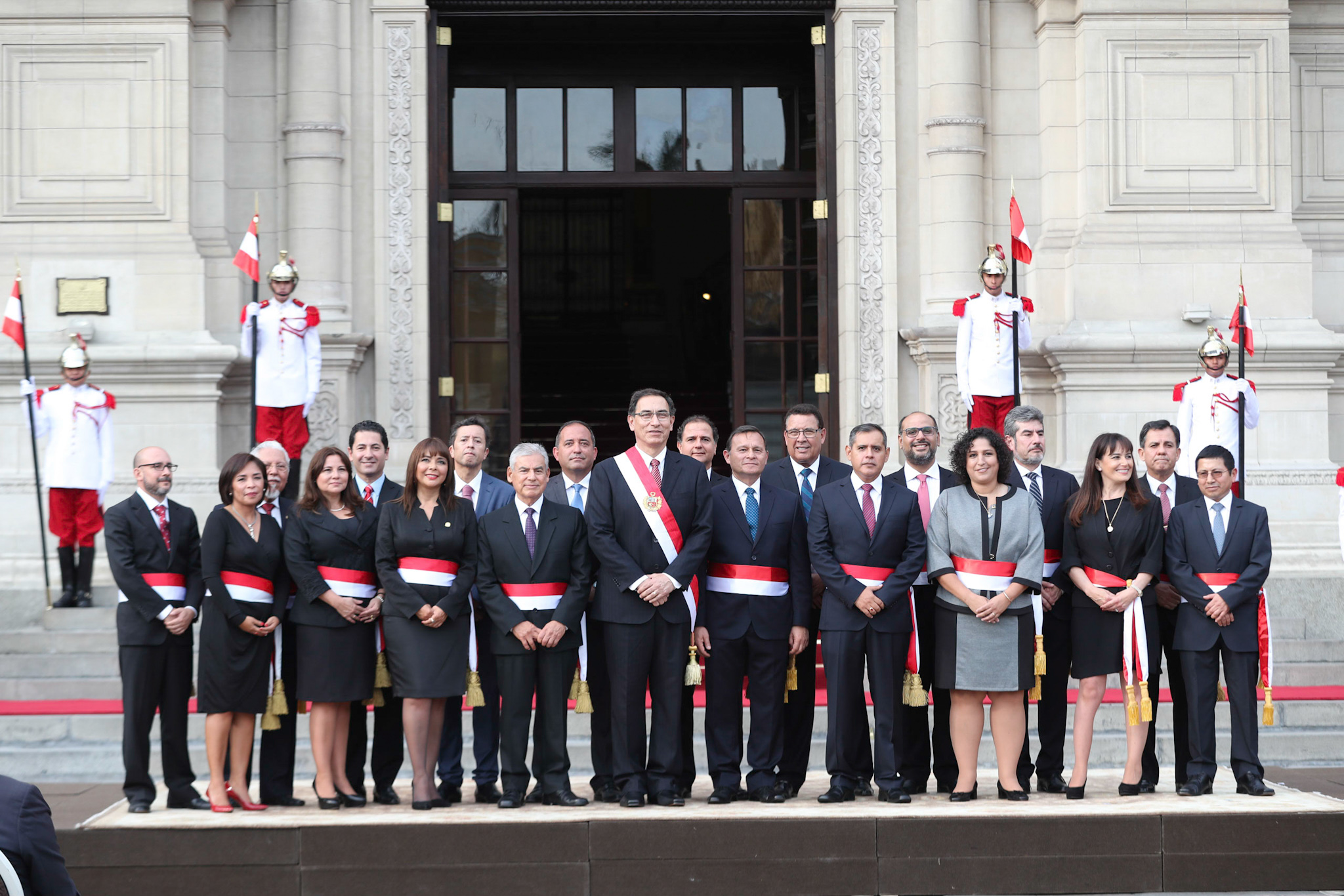 Gabinete del presidente Martín Vizcarra luego de su juramentación en Palacio de Gobierno.